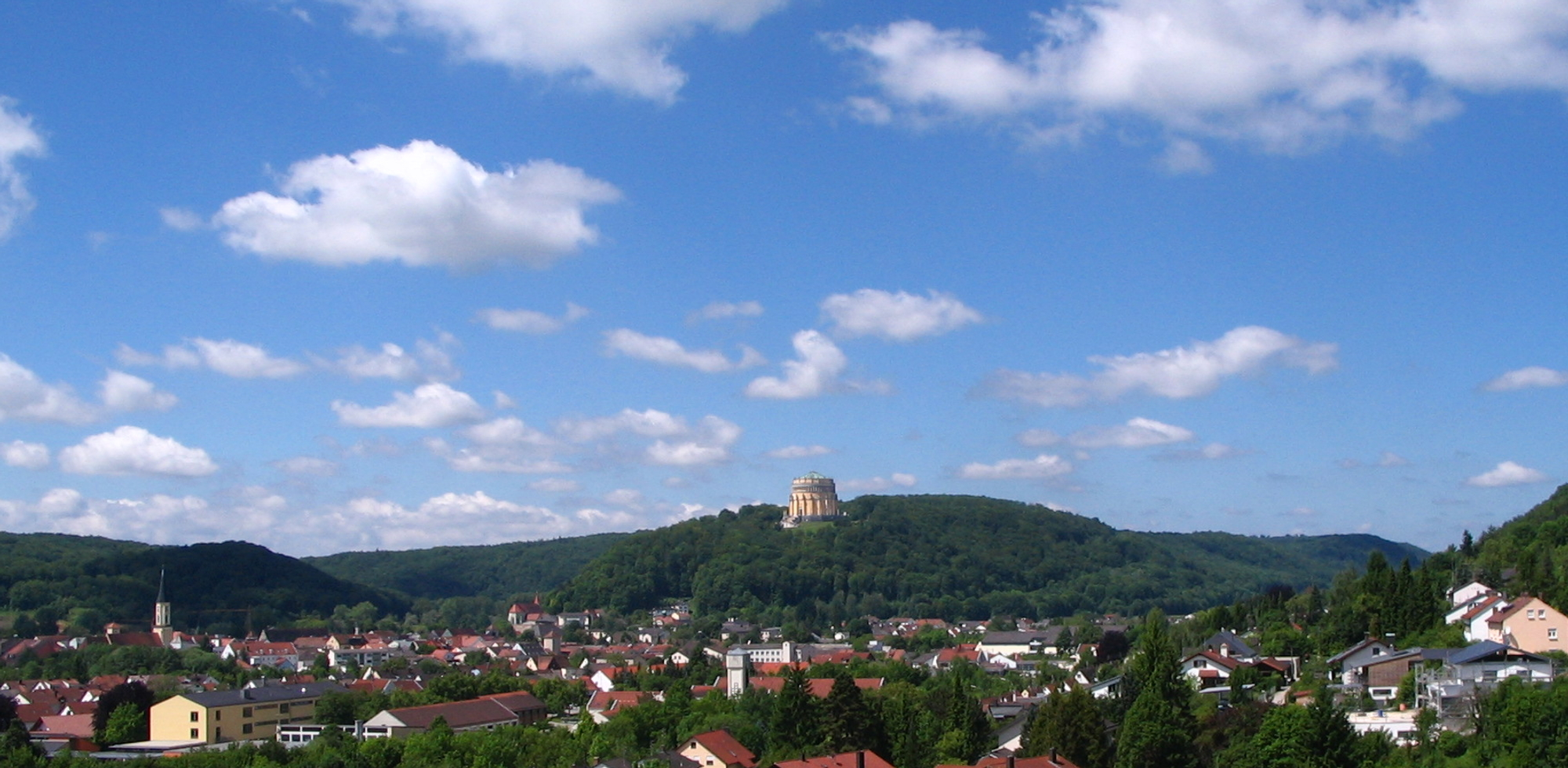 Kelheim, Regierungsbezirk Niederbayern: Der Michelsberg im Mündungsdreieck von Donau und Altmühl, mit Befreiungshalle (Donautal links, Altmühltal rechts)